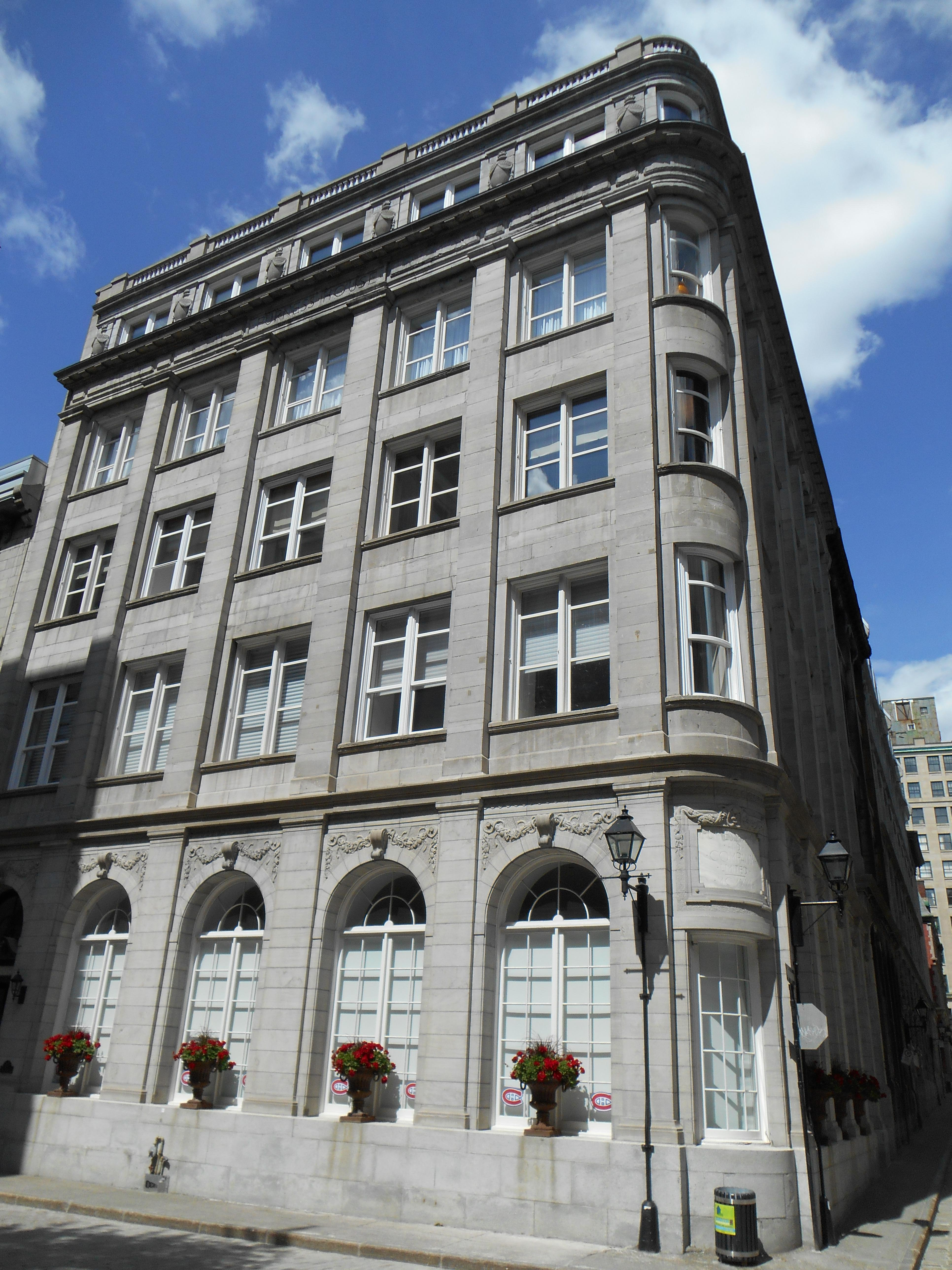 Immeuble Furness Withy, 315, rue du Saint-Sacrement, rue Saint-Alexis (façade latérale sans numéro civique), Montréal